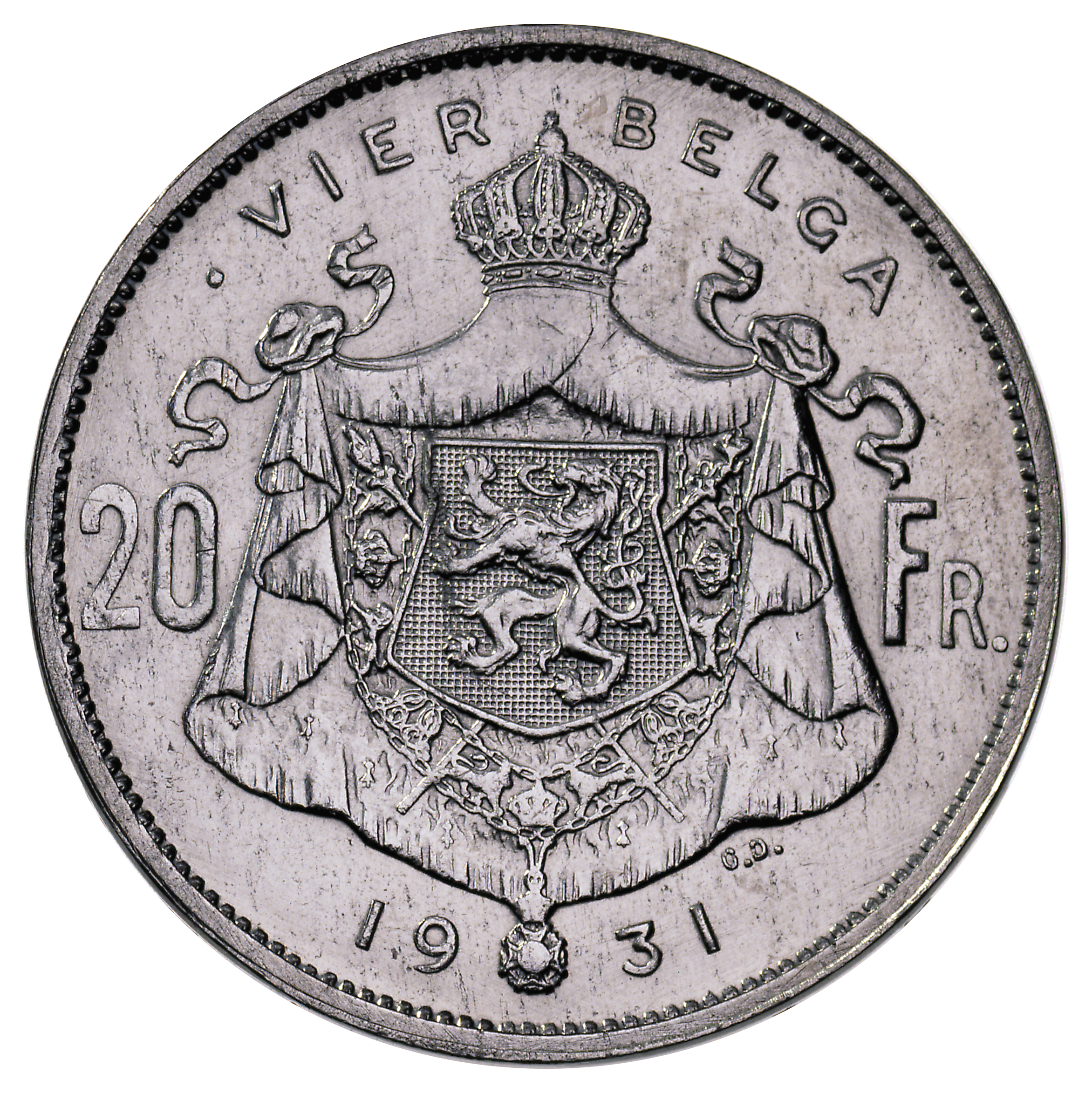 Pièce belge de 20 francs ou 4 belgas (Albert Ier) en néerlandais - revers